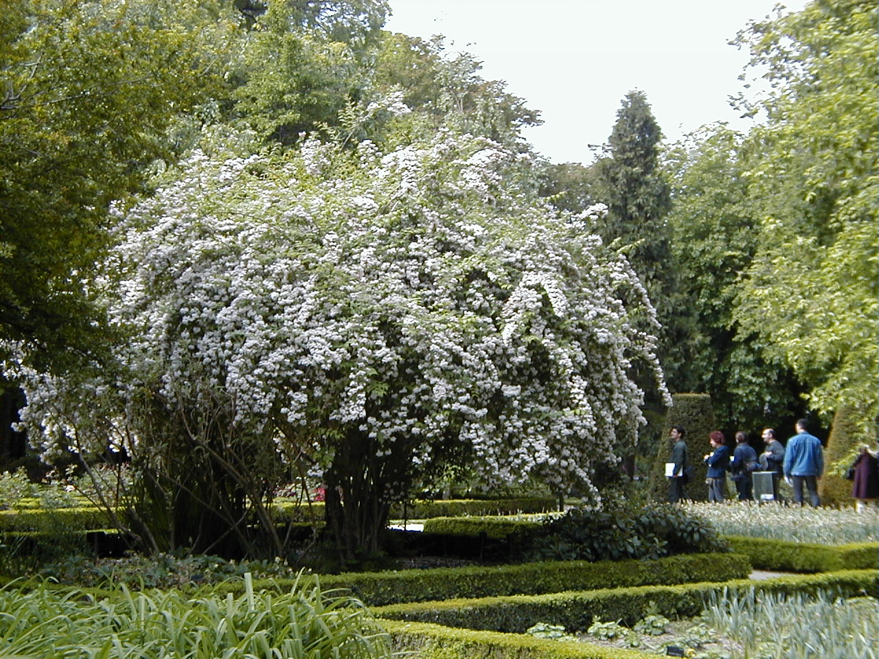 Kolkwitzia amabilis. Real Jardín Botánico de Madrid.